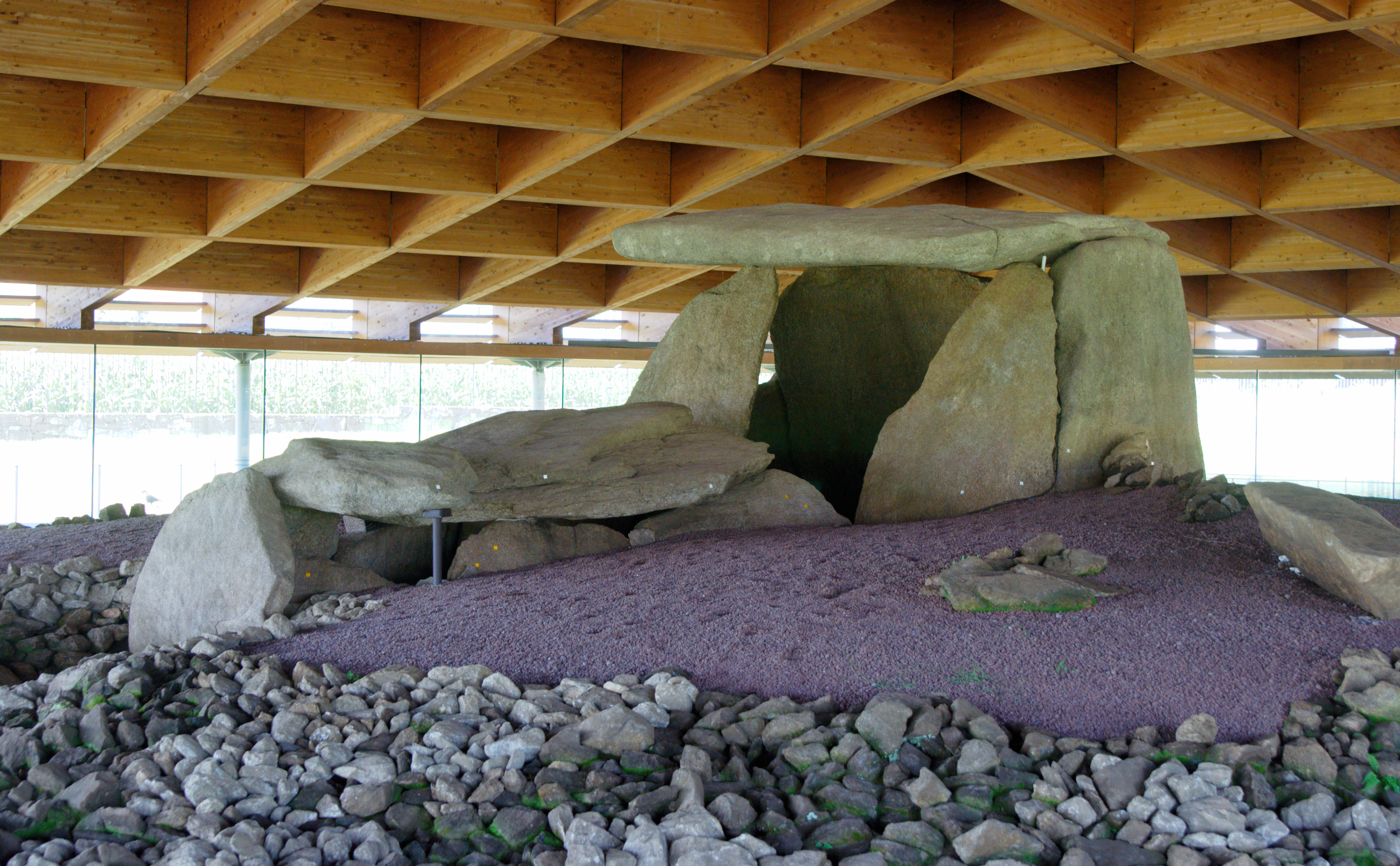 El Dolmen de Dombate en 2014, en su nueva sala protectora